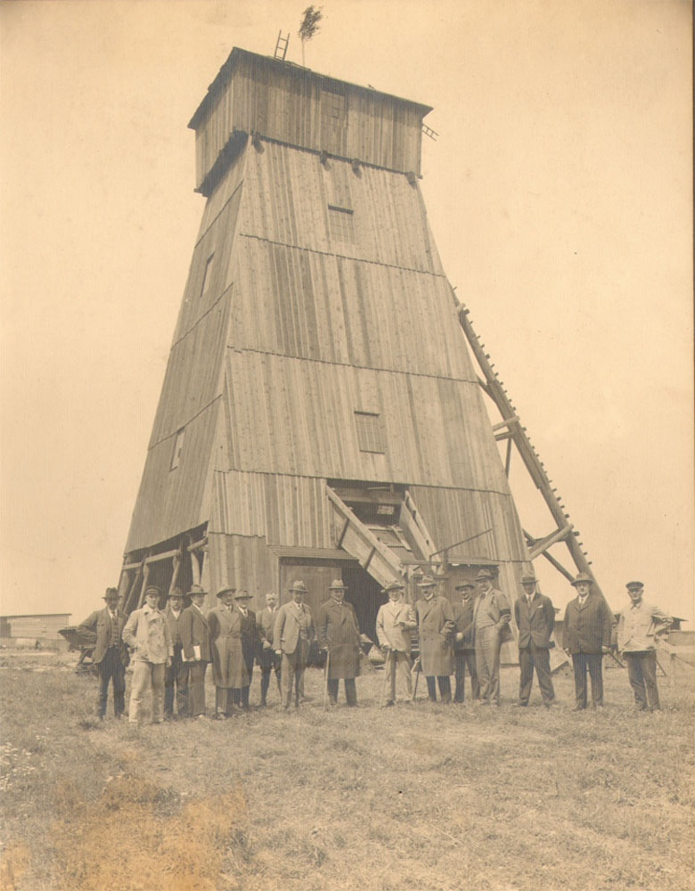 Abteufung Zeche Waltrop Schacht I; Foto, 15 x 10 cm; Heimatmuseum Waltrop